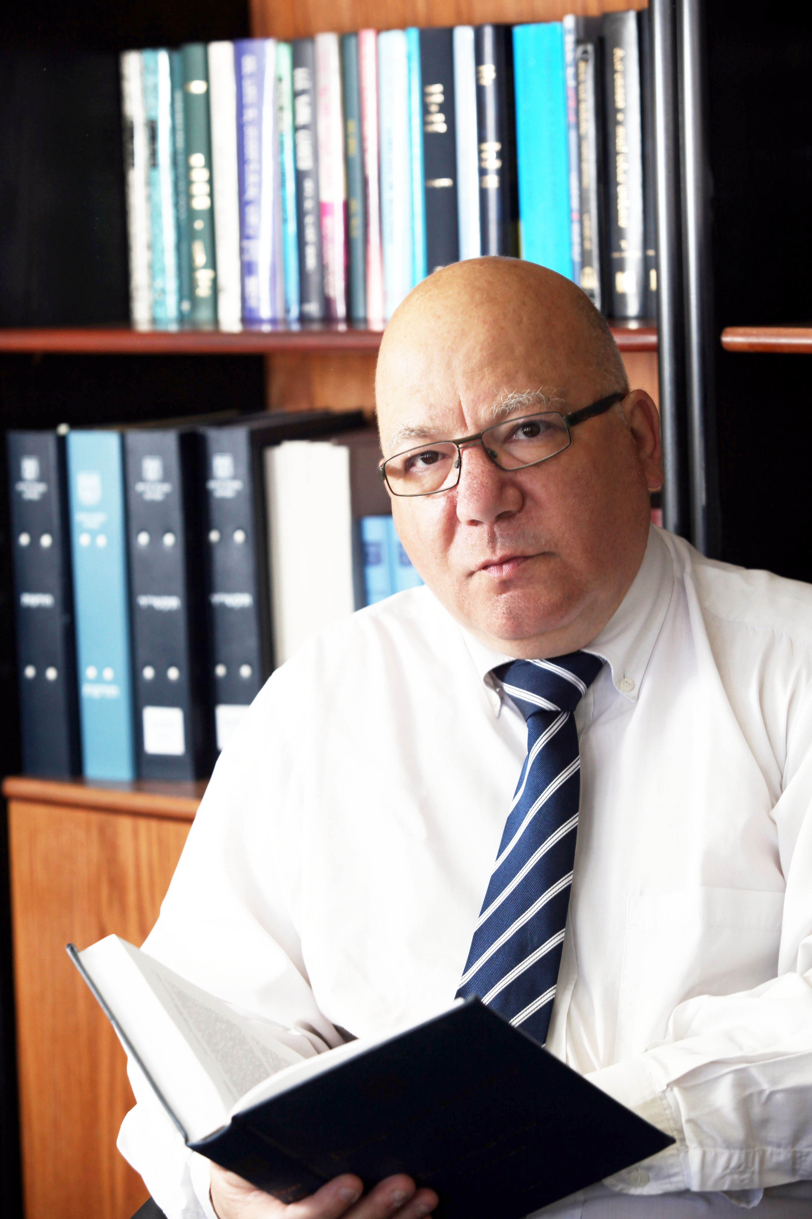 מנהל בתי המשפט בישראל